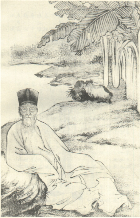 孙奇逢，清代学者。Sun Qifeng